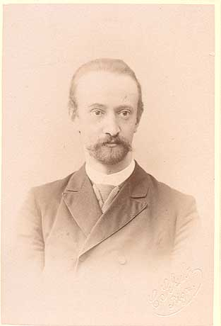 Porträt von Pastor Karl Schilling